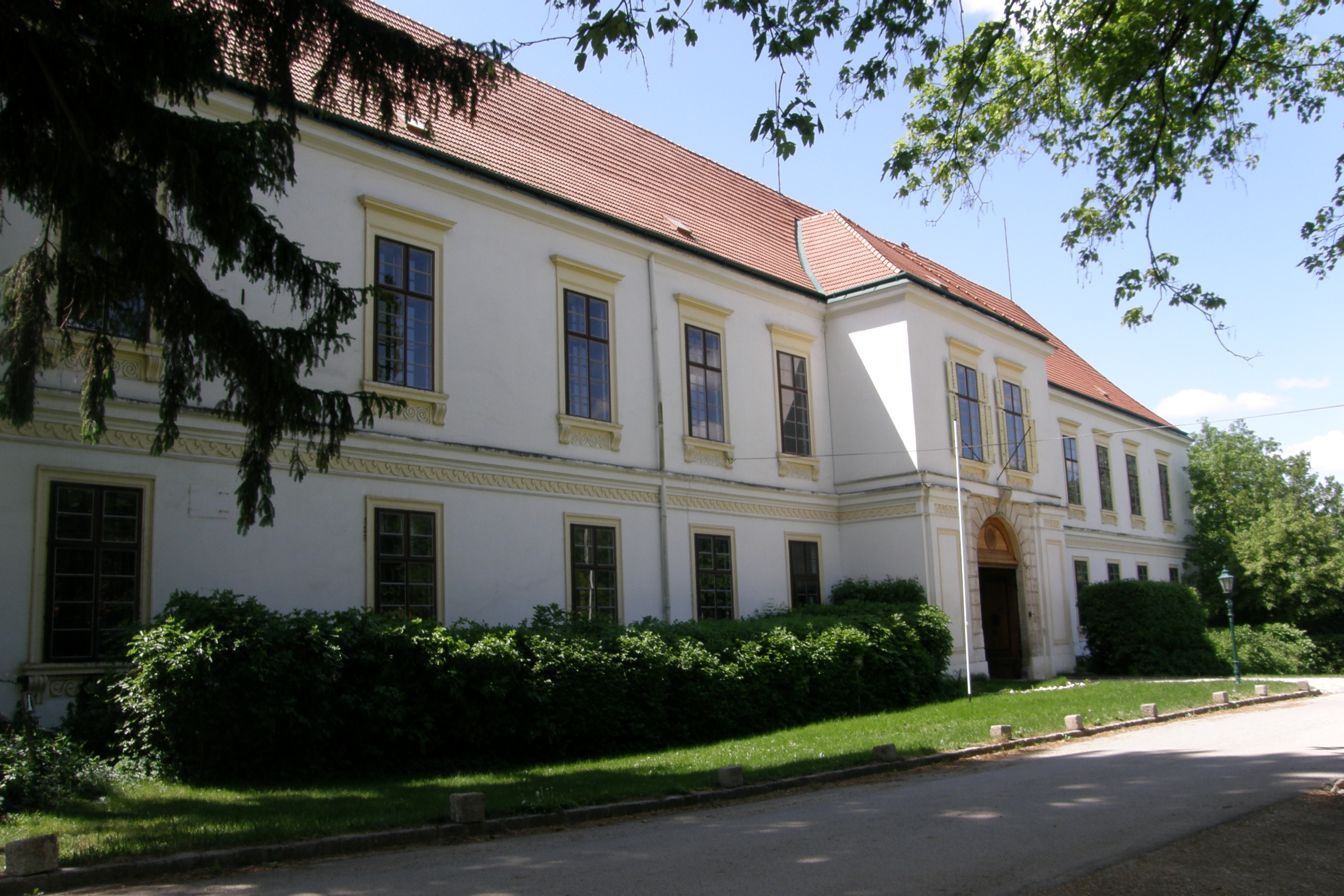 Schloss Loosdorf